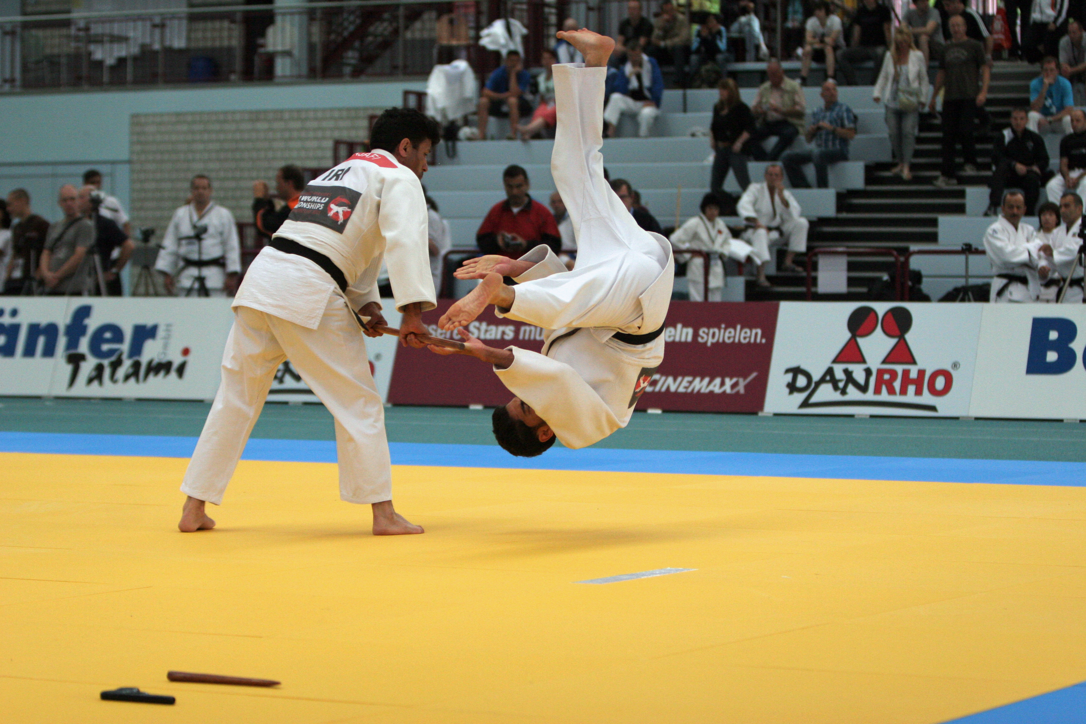 講道館護身術の双手突（もろてづき）、世界形選手権大会イランチームの演技